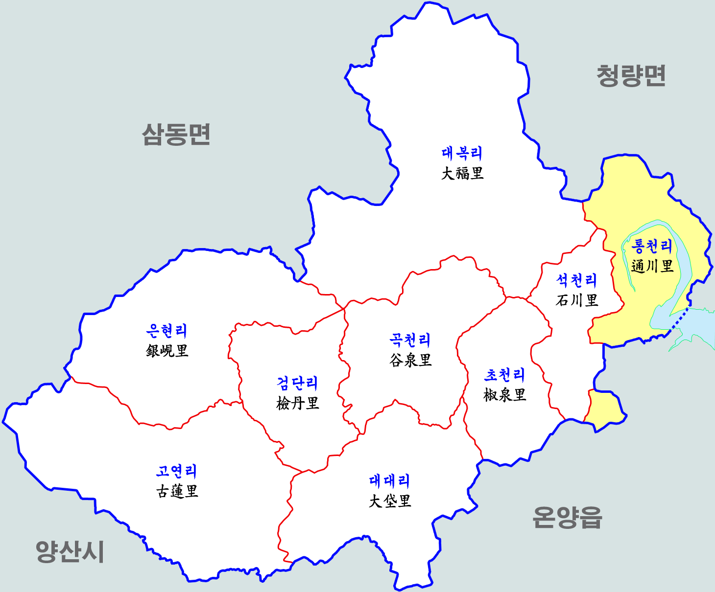 울주군 웅촌면 행정구역도